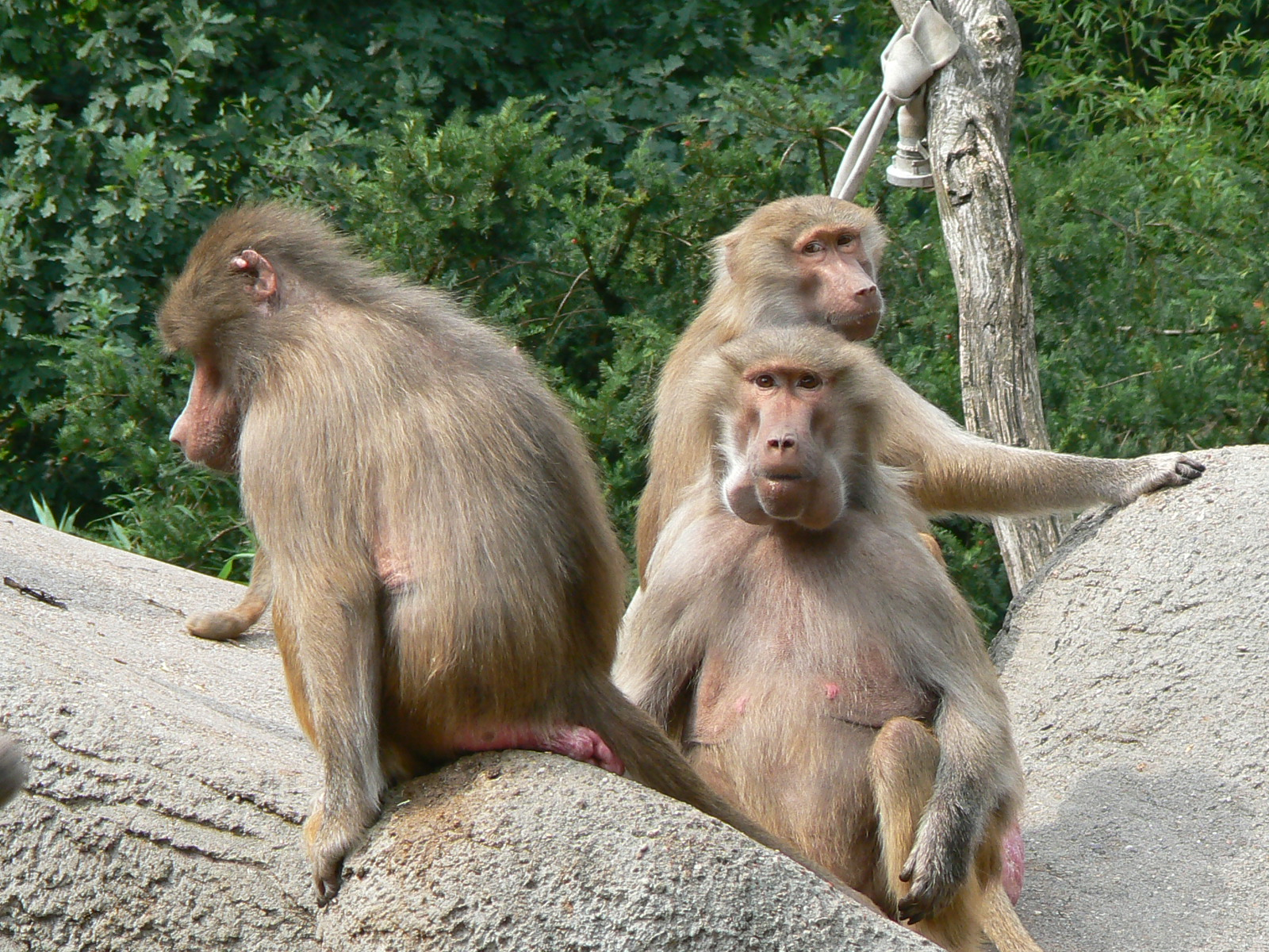 Papio hamadryas / hamadryas baboon / mantelpavian